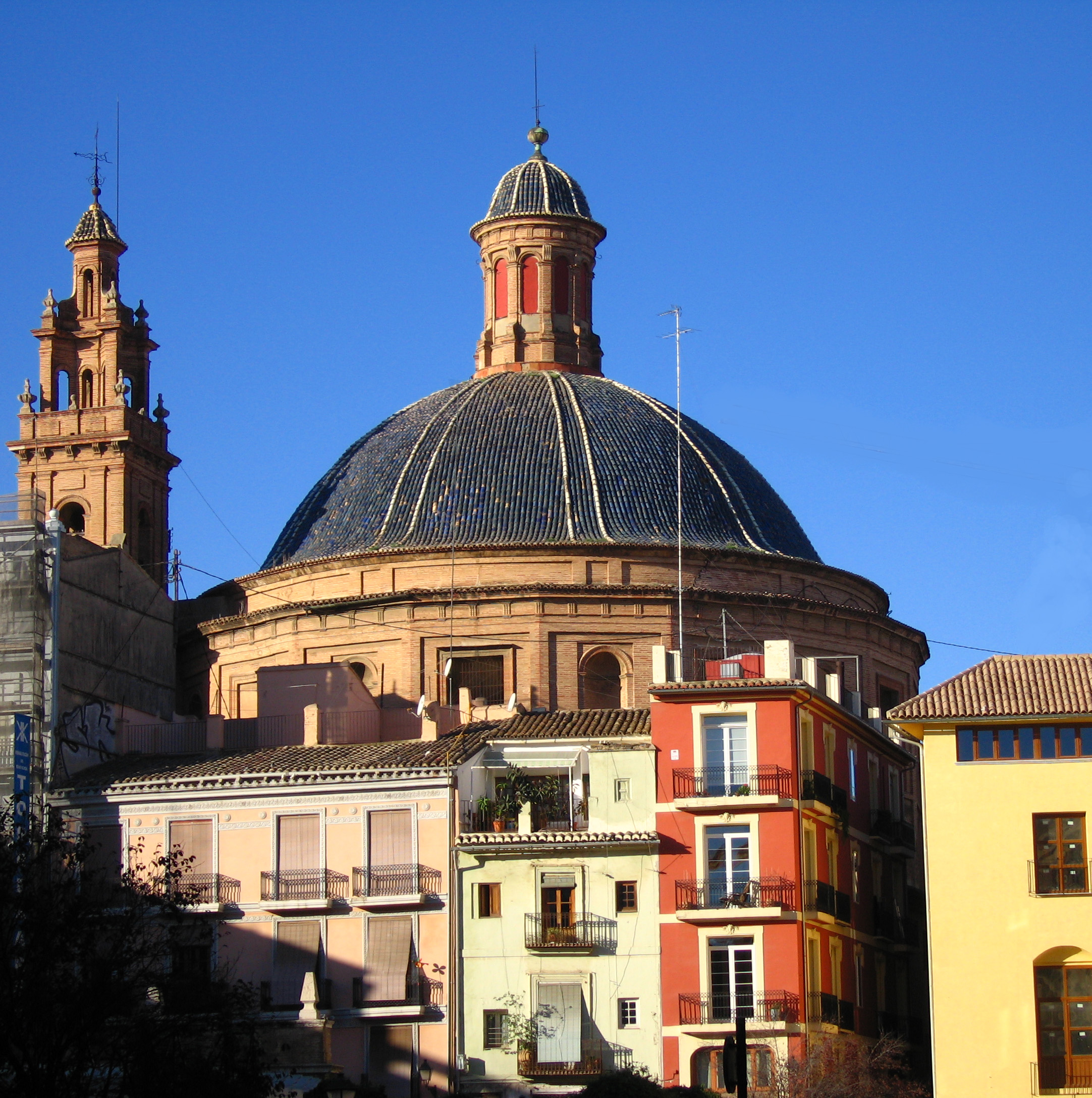 Escola Pia de València